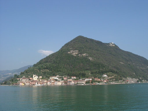 Lago d'Iseo - Monte Isola & Peschiera Maràglio